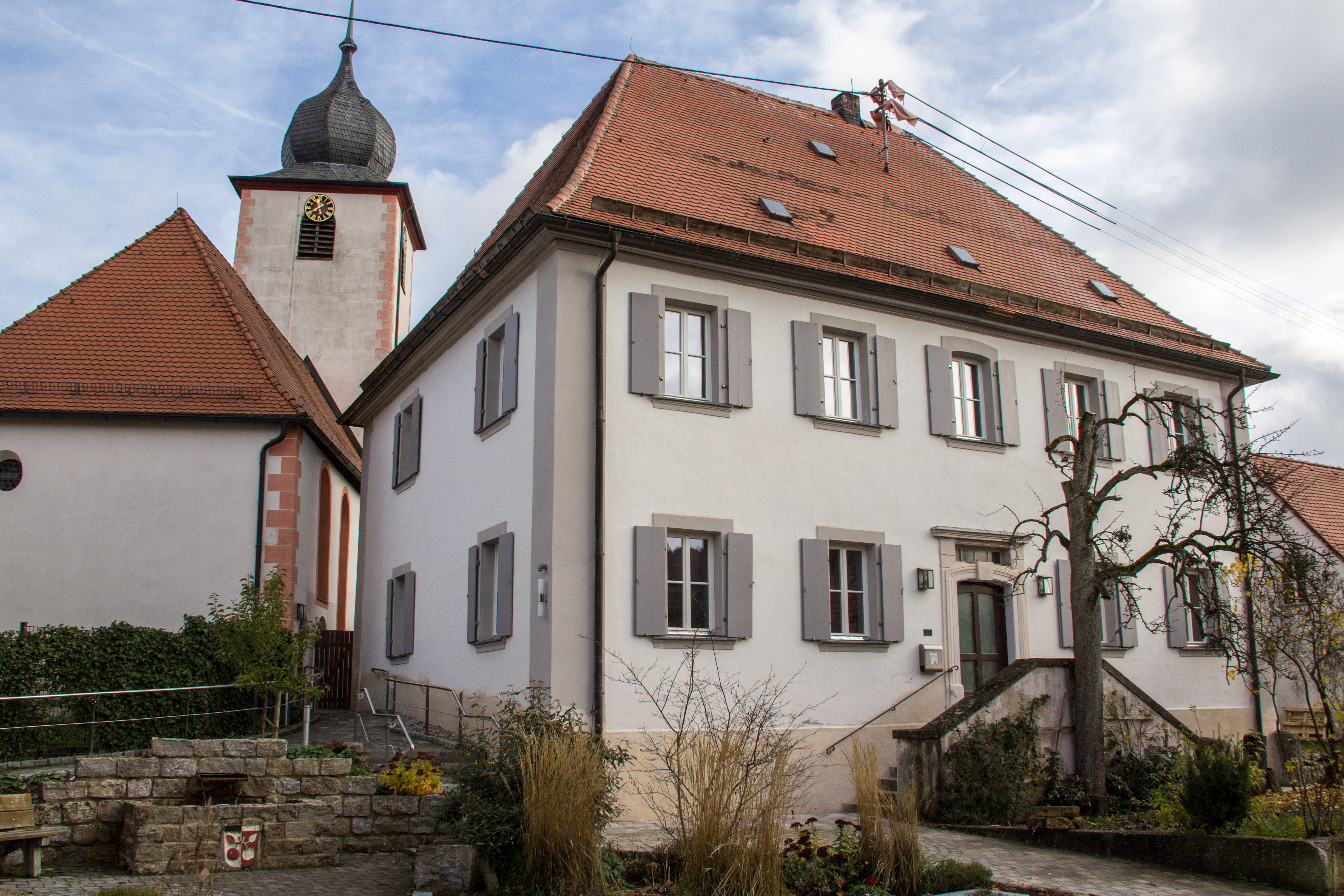 Affalterthal